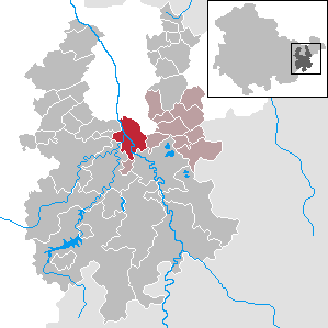 Wünschendorf/Elster in Thuringia - District Greiz